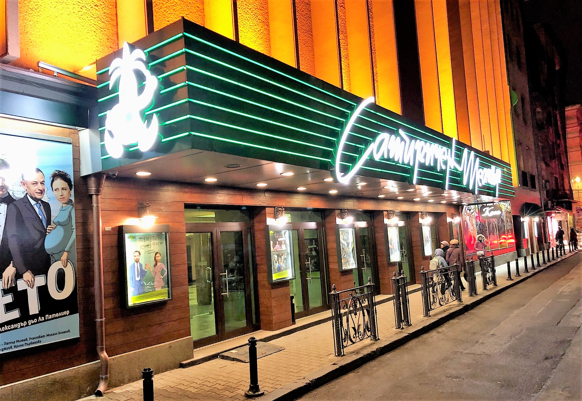 сатиричен театър Алеко Константинов София